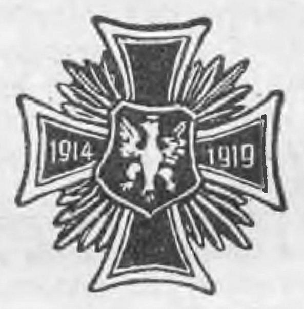 Związek Powstańców Wielkopolskich